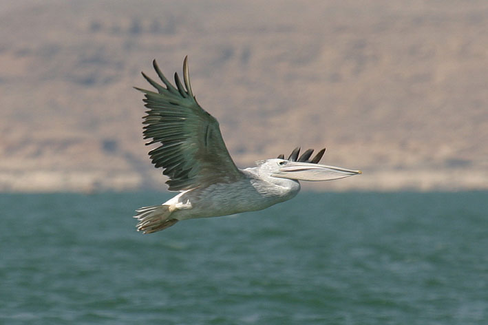 Pelecanus rufescens lake Naser.jpg: рожевоспинний пелікан у польоті над озером Насер, Єгипет